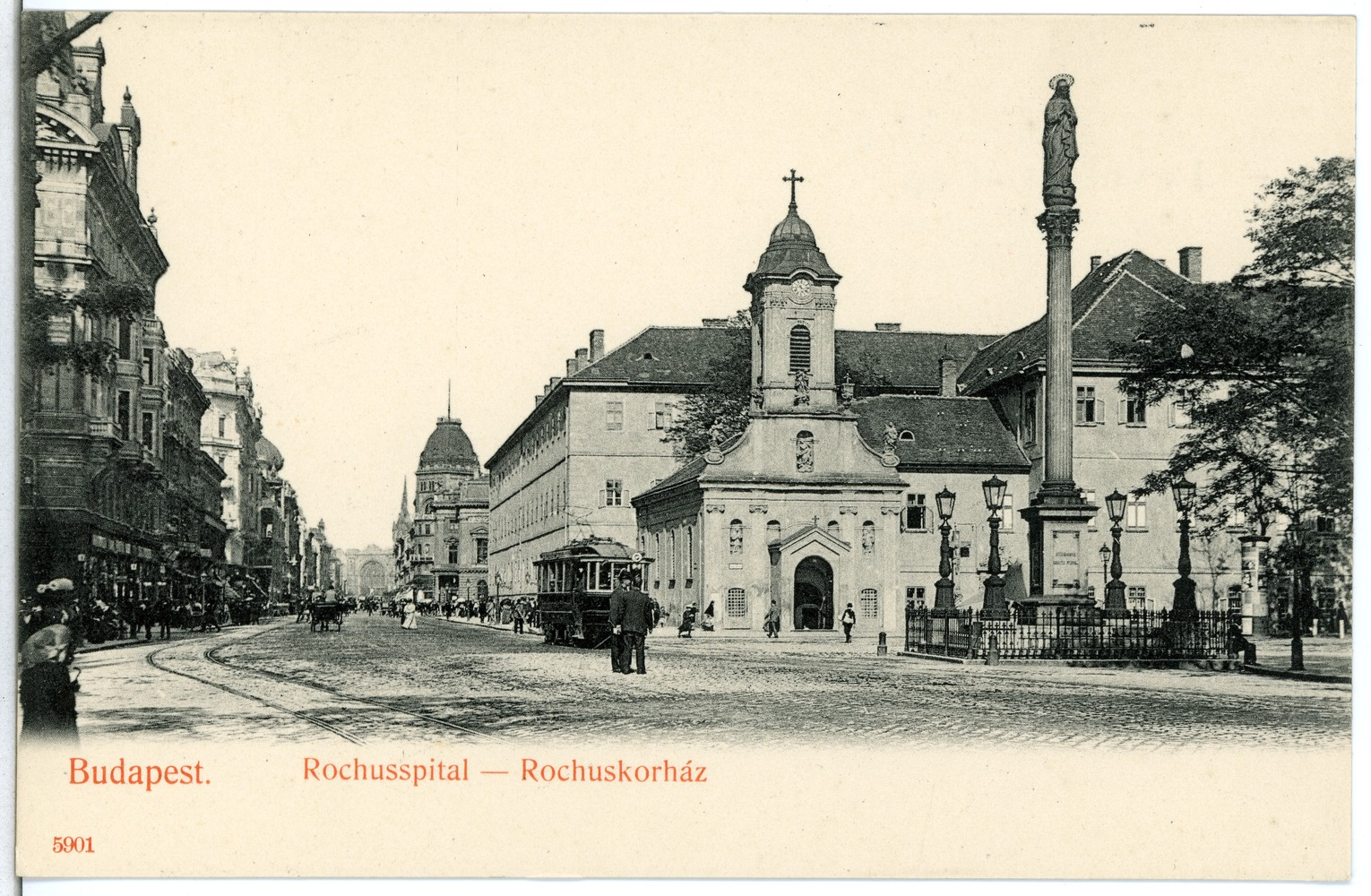 Budapest; Rochusspital mit Straßenbahn This postcard is from publisher Brück & Sohn in Meißen ( This postcard has a unique number 05901 and is available in a higher resolution at the publisher. This images was uploaded in a cooperation project between Wikipedians and the publisher.